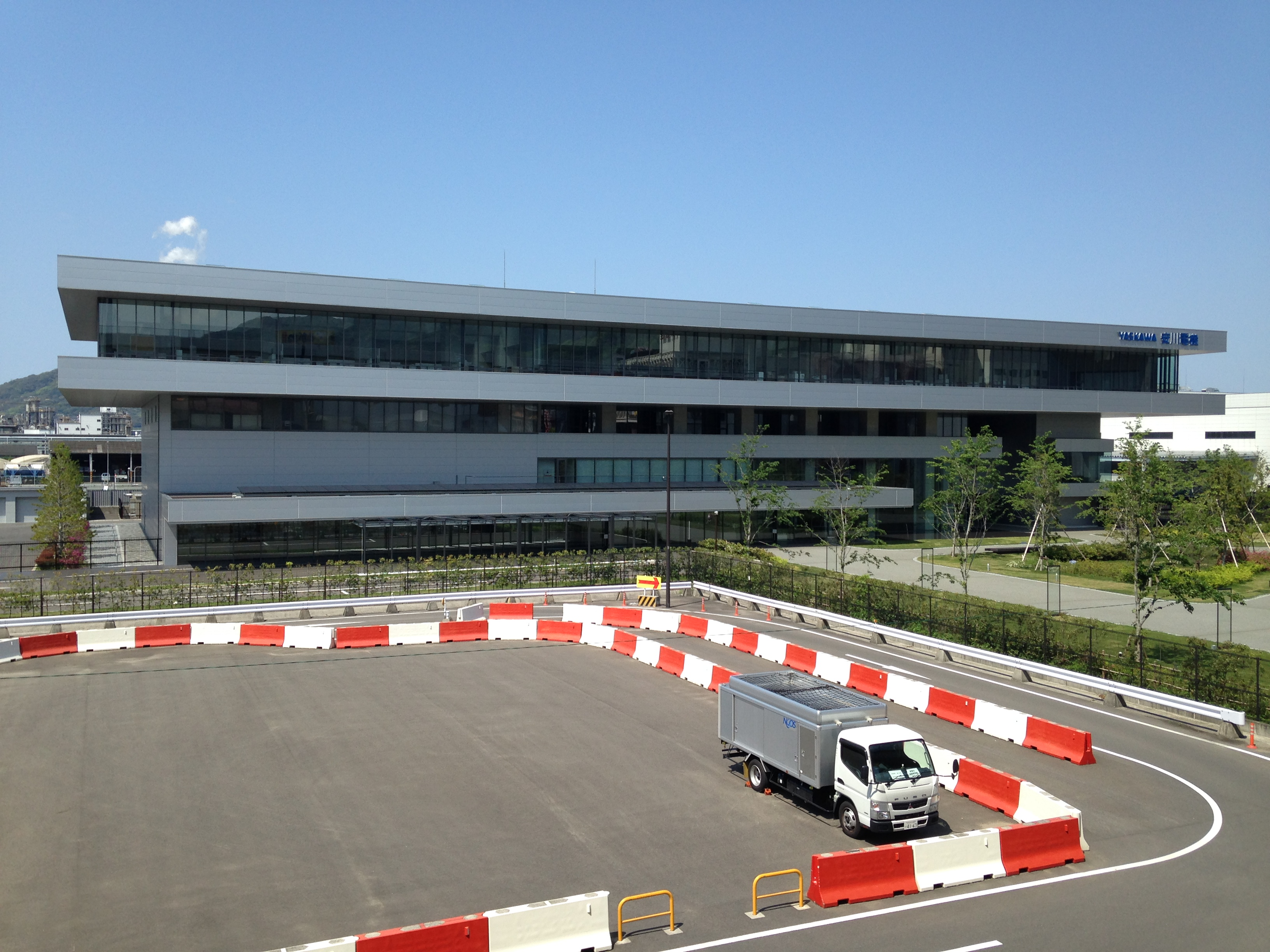 安川電機本社